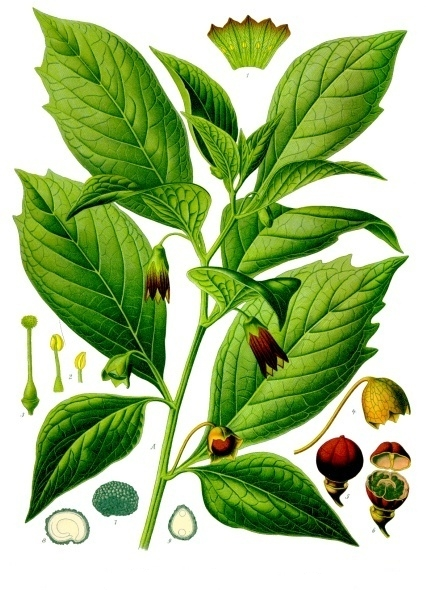 Tollkraut. A Zweig der Pflanze mit Blüten und Früchten, etwas verkleinert. 1 Fruchtkelch; 2 Staubblätter; 3 Stempel; 4 Fruchtkelch; 5 Kapsel ohne Fruchtkelch; 6 dieselbe geöffnet, Deckel der Kapsel, von innen gesehen; 7 Samen; 8 derselbe im Längsschnitt; 9 derselbe im Querschnitt. 1—9 vergrössert.